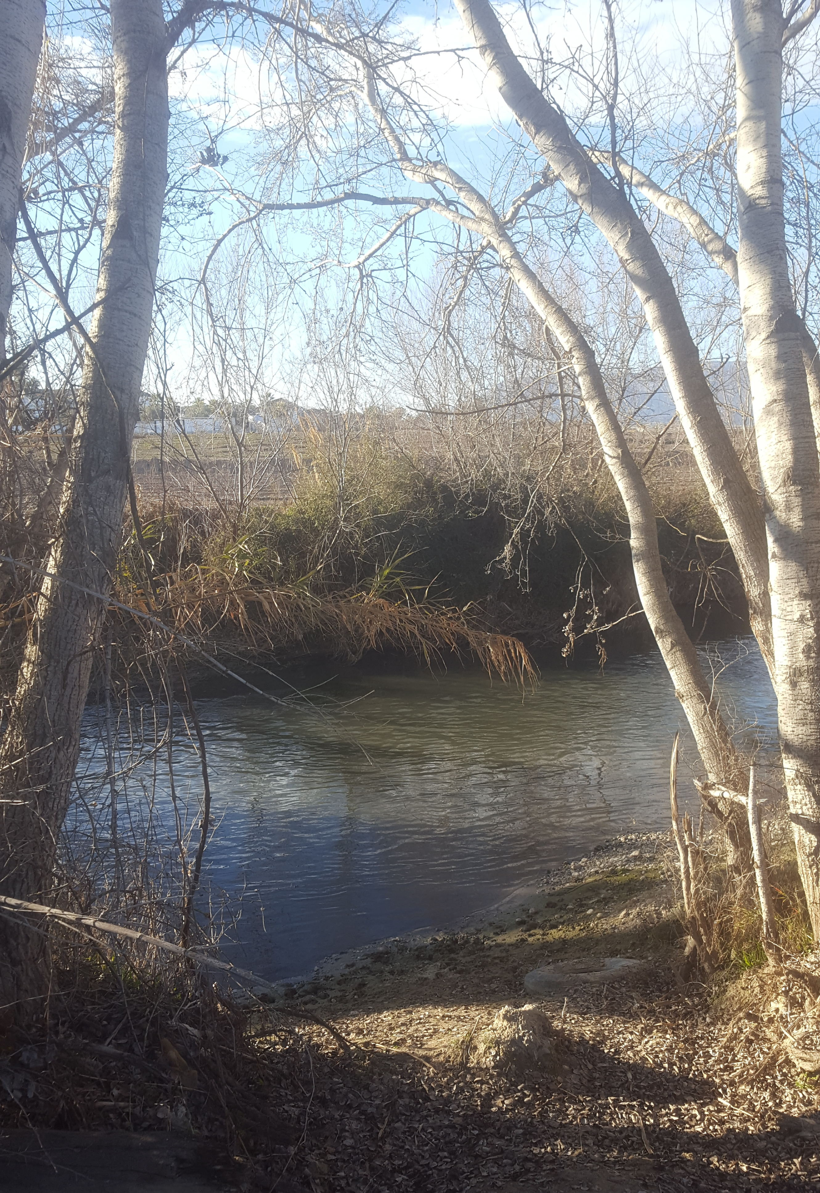 El río Genil a su paso por el municipio de Láchar (Granada, España). En este punto actúa como límite con el municipio de Fuente Vaqueros, en la orilla de enfrente.